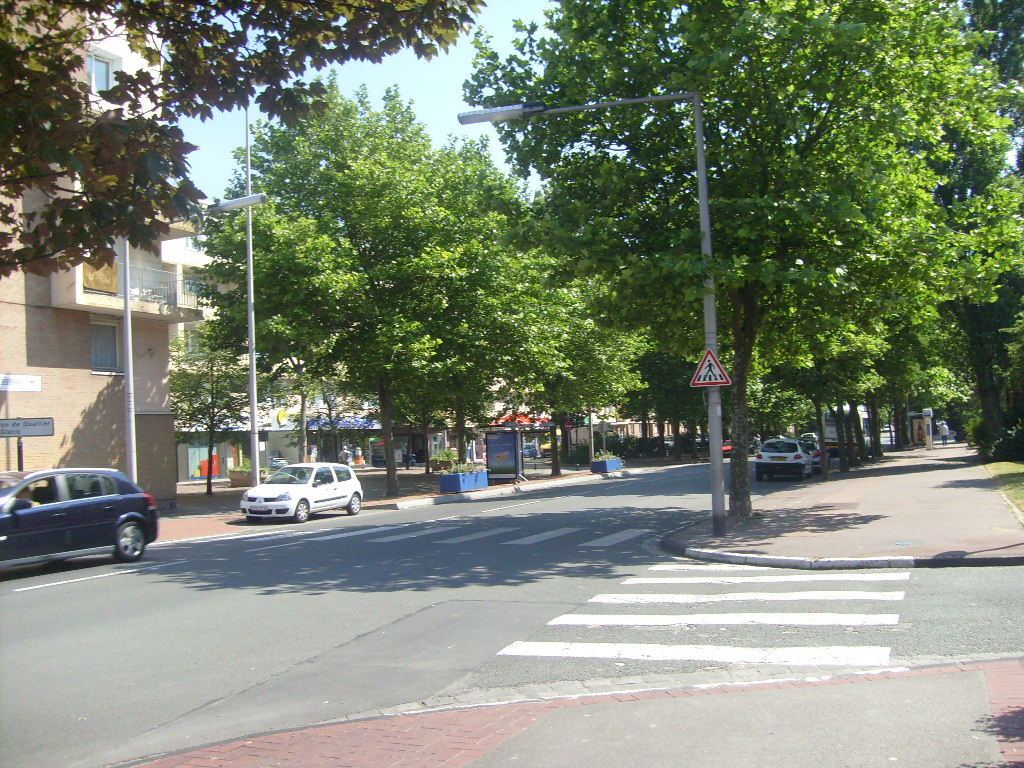 Quartier des Glacis à Dunkerque